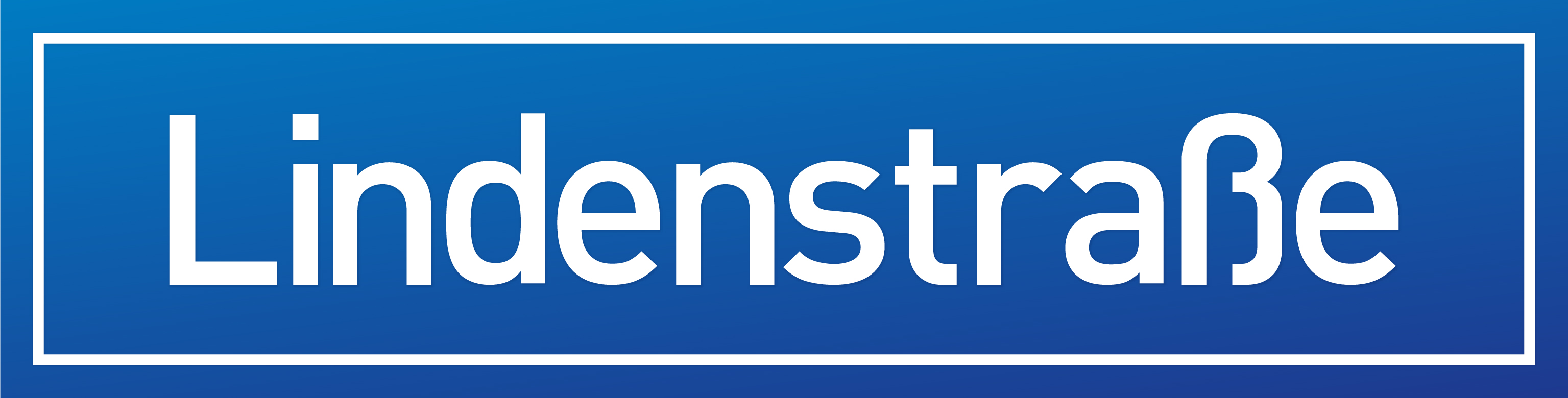 2015; ARD; Das Erste; GFF KG; Grafik&Layout; Logo; Lindenstrasse; Lindenstraße; WDR